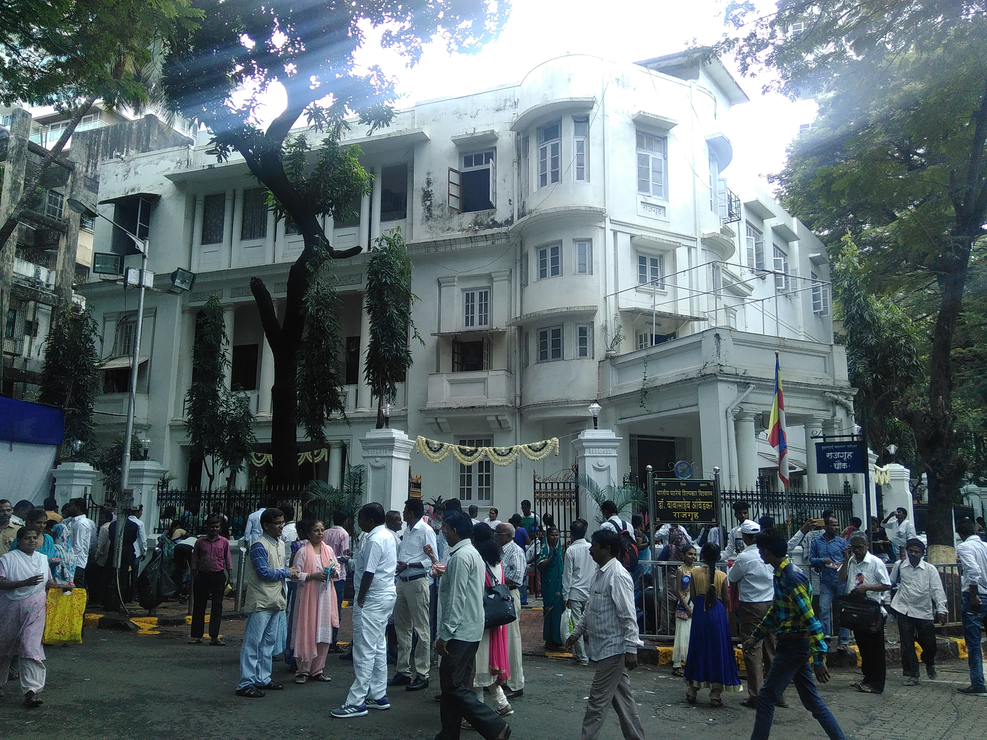 Rajgruha - the house of Dr. Babasaheb Ambedkar at Hindu colony of Dadar, Mumbai, Maharashtra.